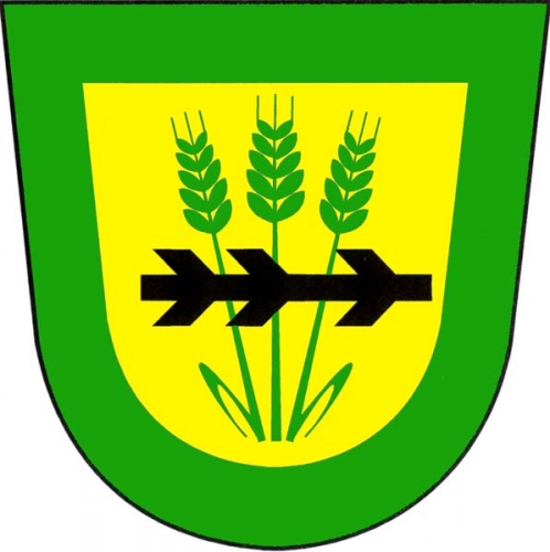 znak, Velký Karlov, okres Znojmo